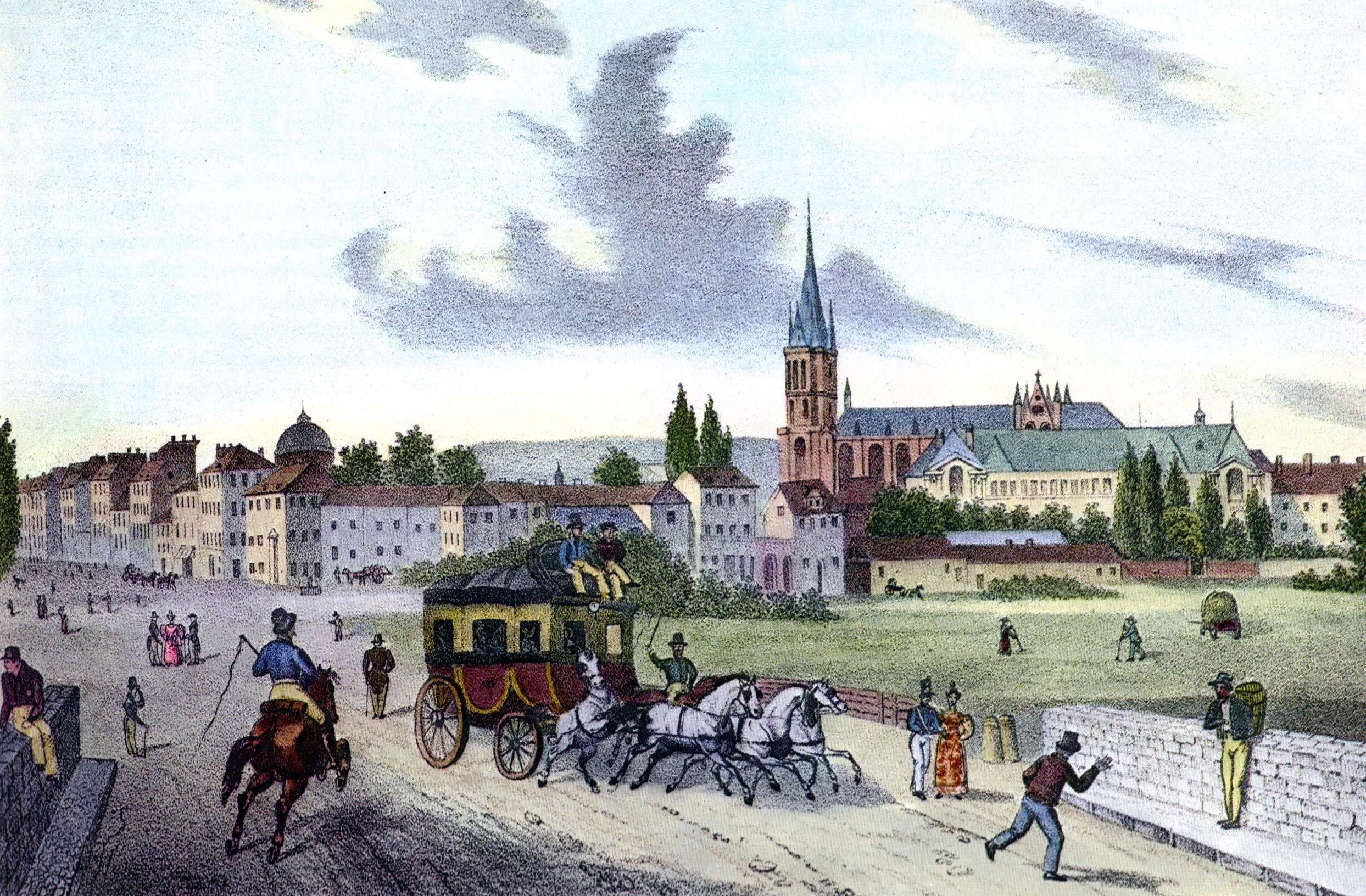 Saint Denis around 1830. Artist: C. Studer.